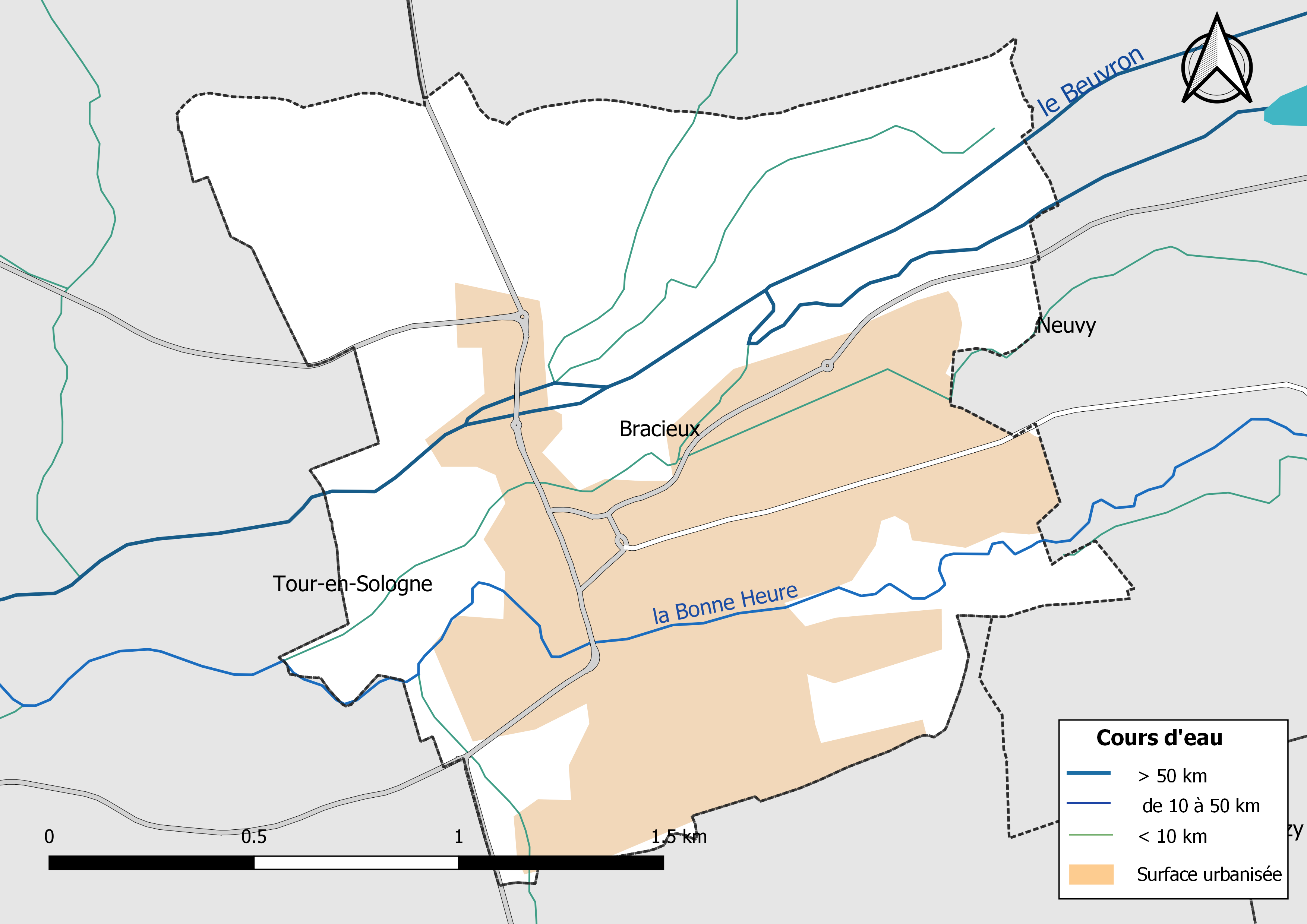 Carte du réseau hydrographique de la commune de Bracieux (France).